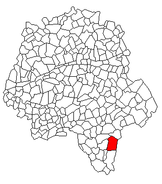 Localisation de Charnizay en Indre et Loire